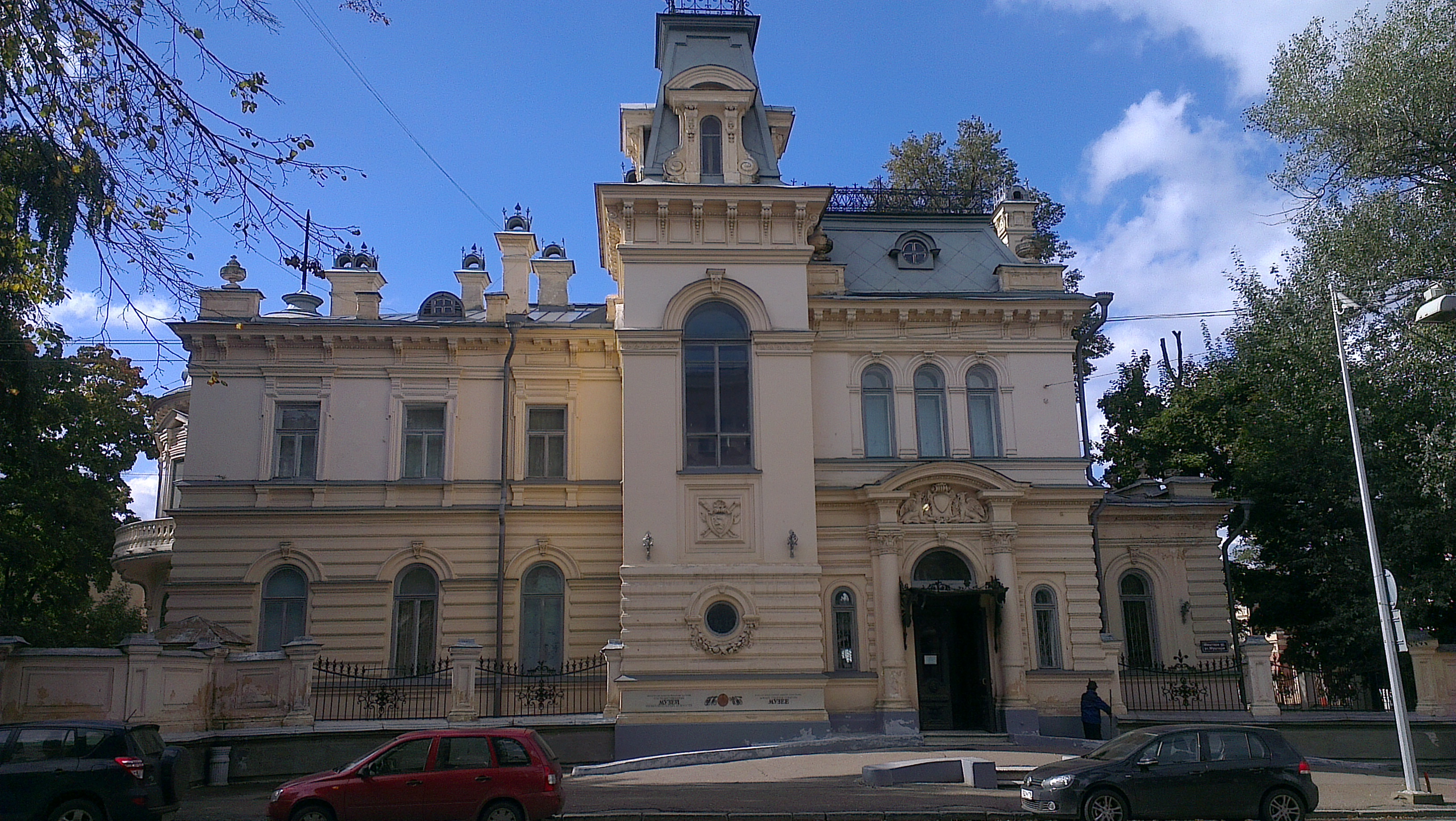 Усадьба Сандецкого в Казани